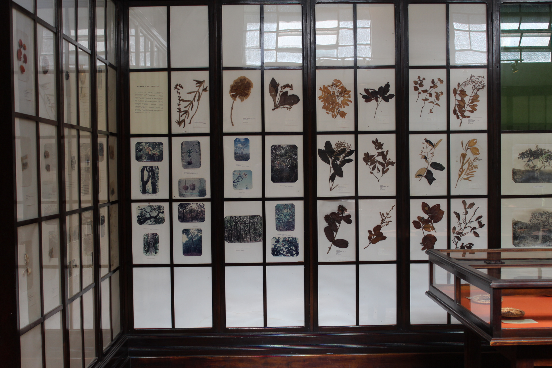 Sala do museu 2